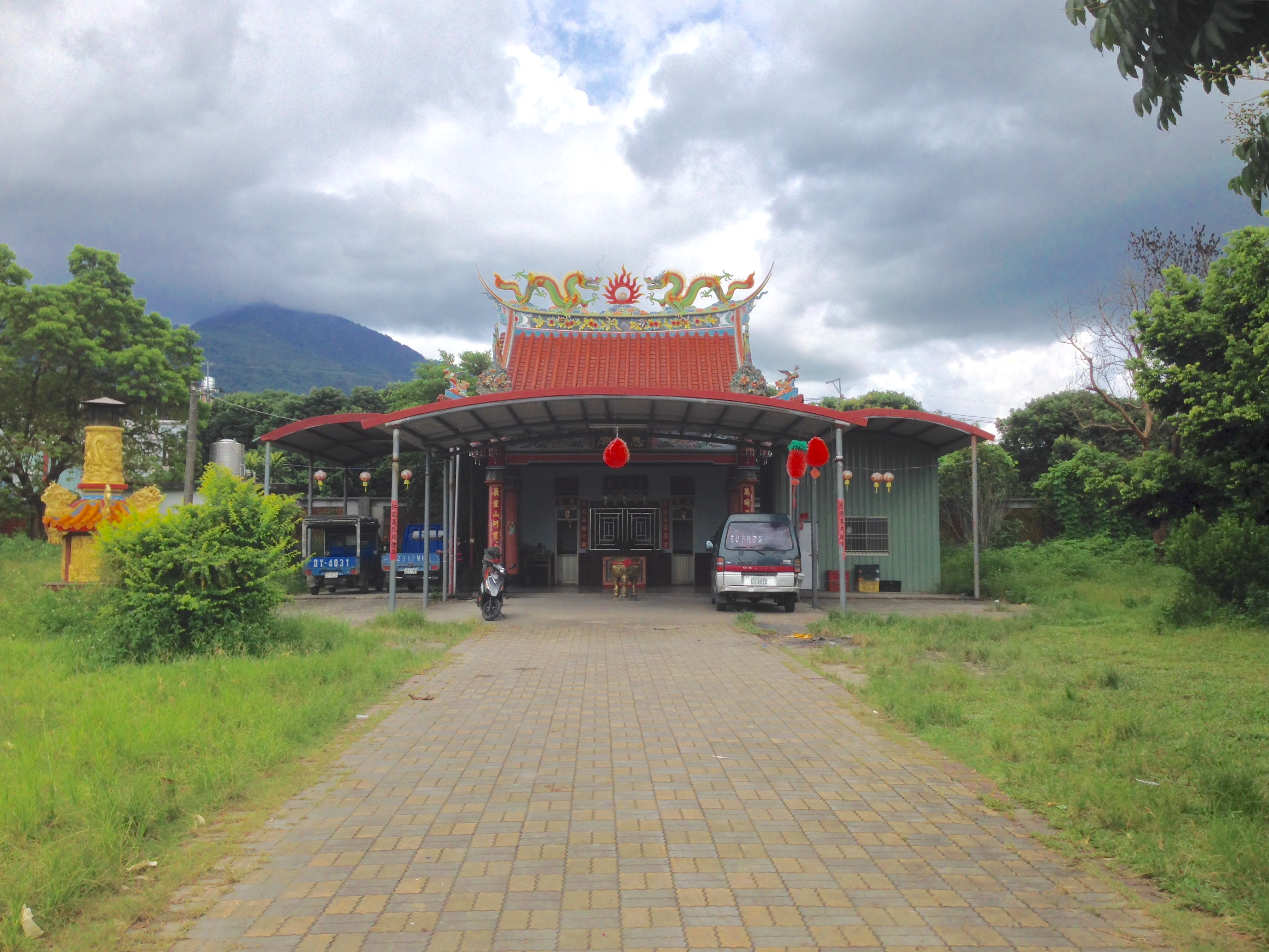 中文（台灣）: 大路關恩公廟